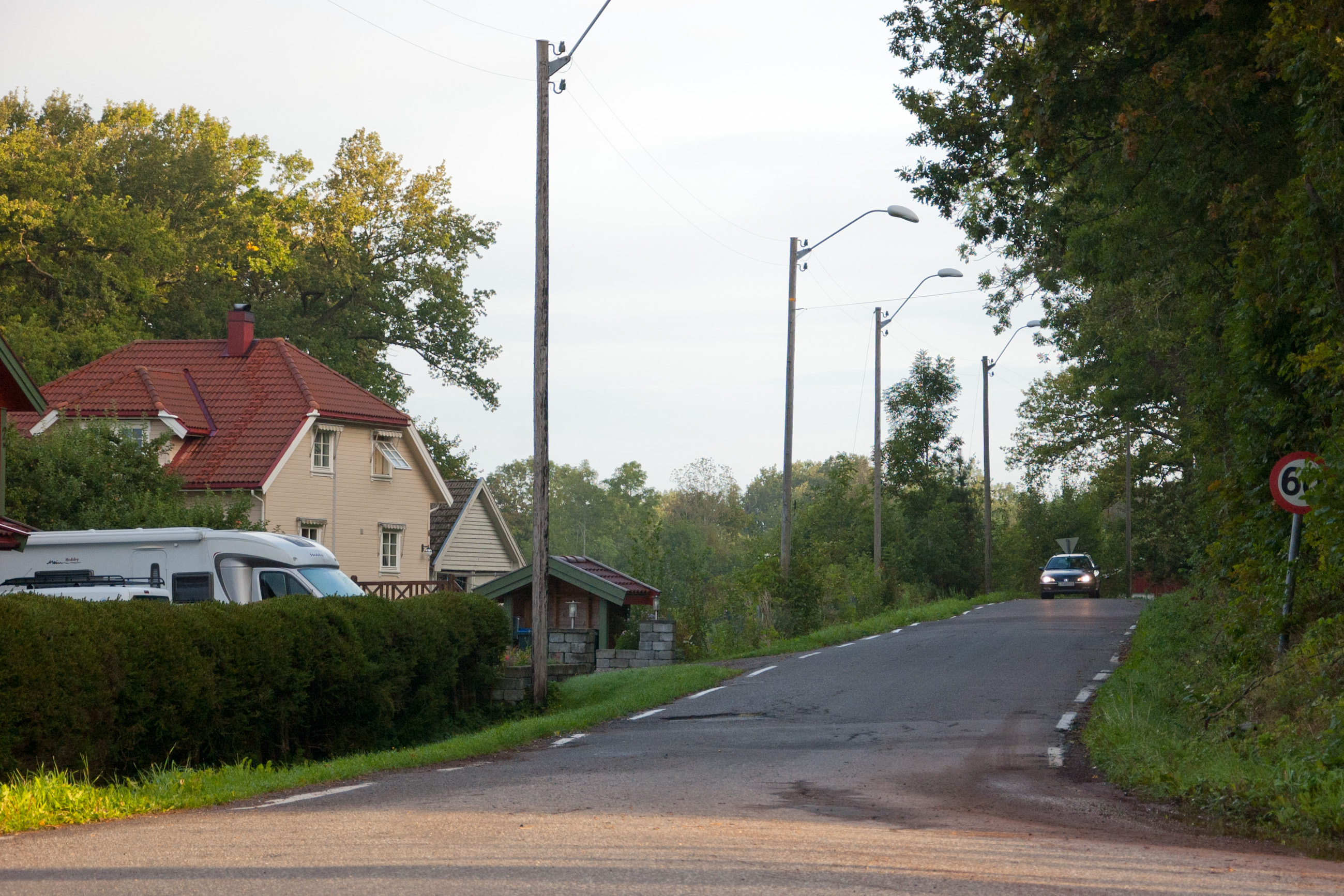 Fylkesvei 534 Røråsveien i Tønsberg, Vestfold